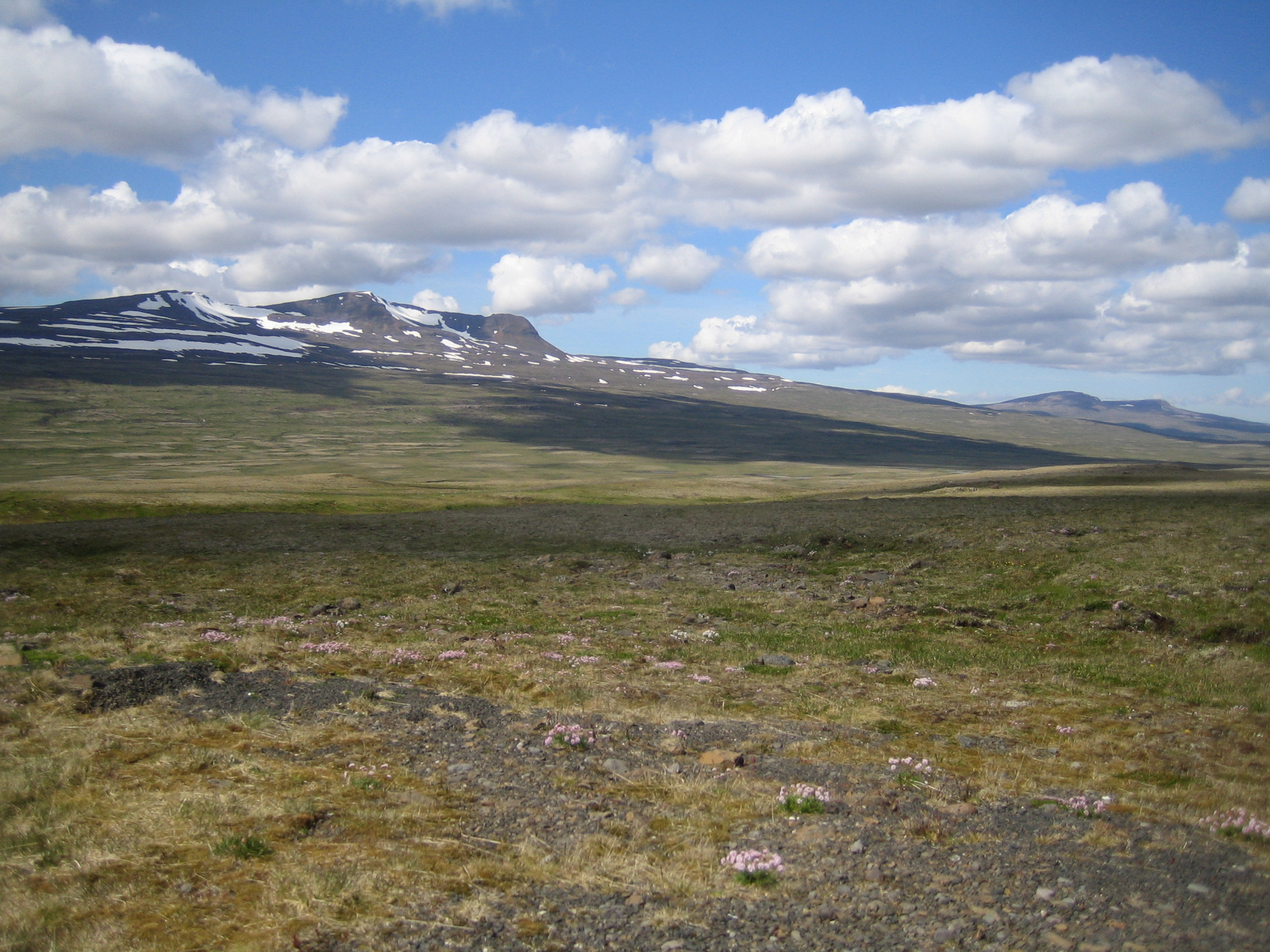 Holtavörðuheiði á Íslandi